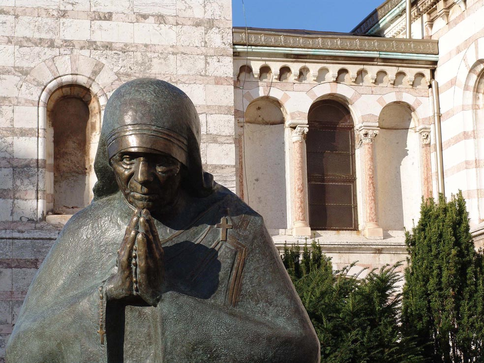 Infoslika Opis: Na fotografiji je Spomenik Majke Tereze u Puli Izvor: Gicetova osobna foto-arhiva Autor: Giceto Objašnjenje: Suradnik Giceto snimio je ovu fotografiju i stavlja je Wikipediji na raspolaganje za neograničenu uporabu